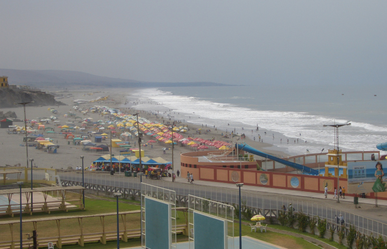 Playa de ciudad Mollendo, Peru